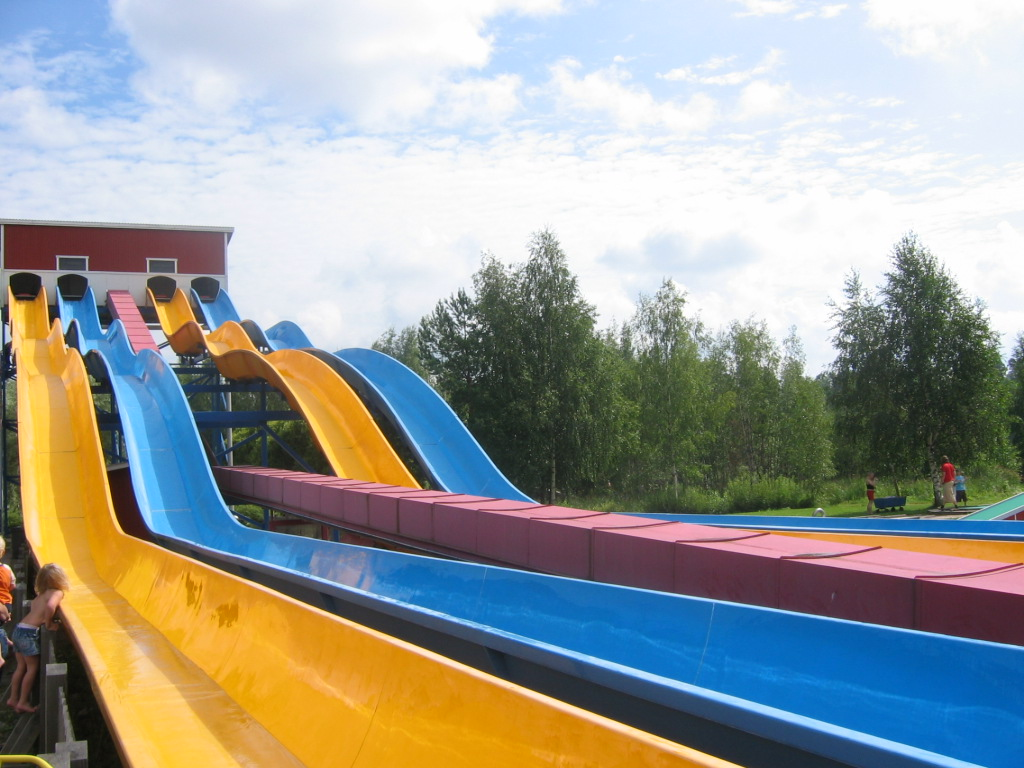 Puuhamaa "Victorian putoukset" liukumäet